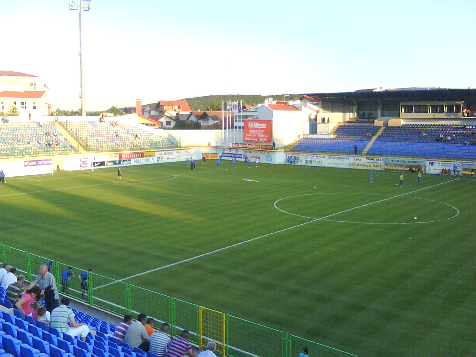 Pecara-utakmica Široki Brijeg-Banants